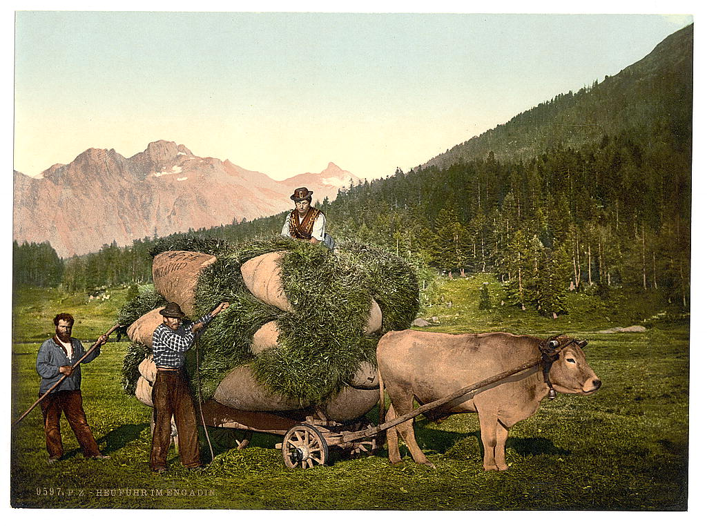 Senoseč v Engadinu, Grisons, Švýcarsko